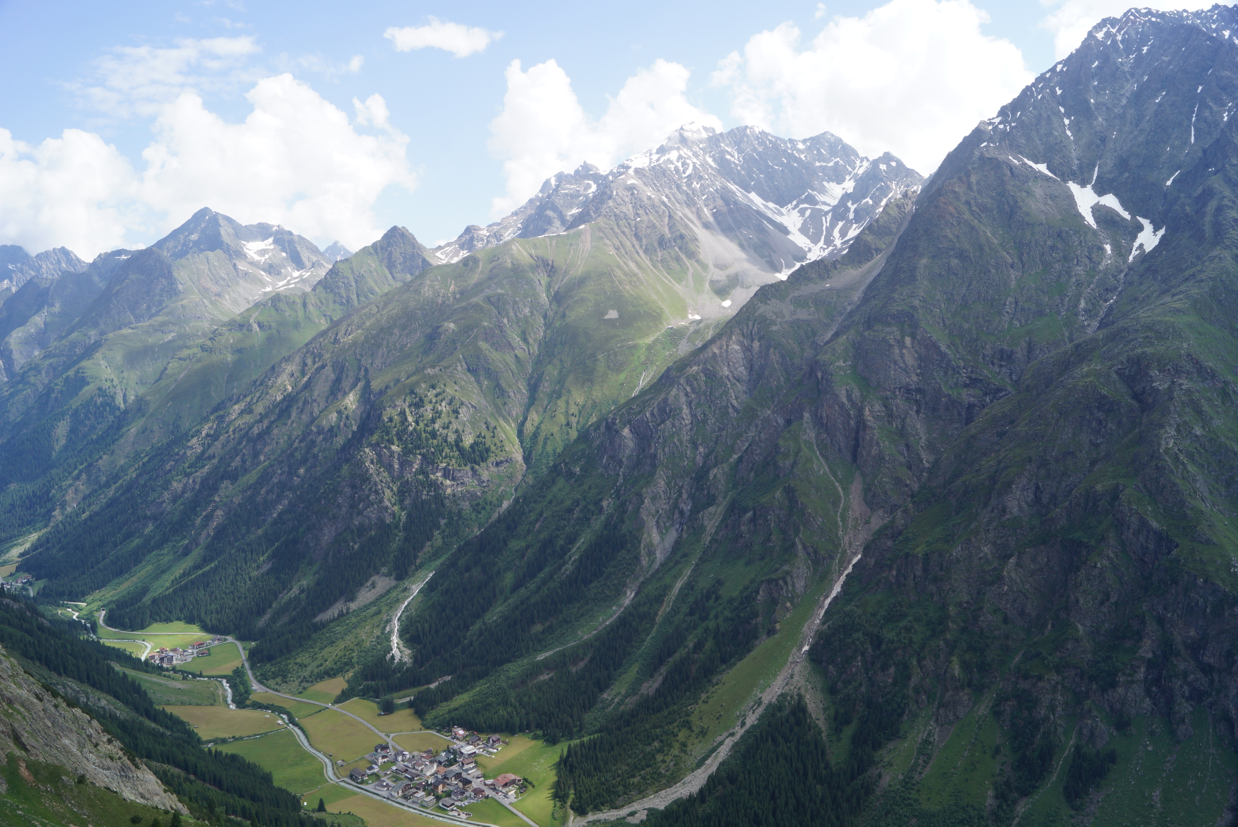 Weißwald & Plangeross im Pitztal, Ötztaler Alpen, Österreich, oben: Gahwinden, Rüsselsheimer Hütte & Hohe Geige {BF130718-1101}.